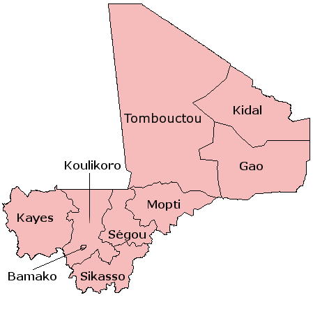 Mali regions